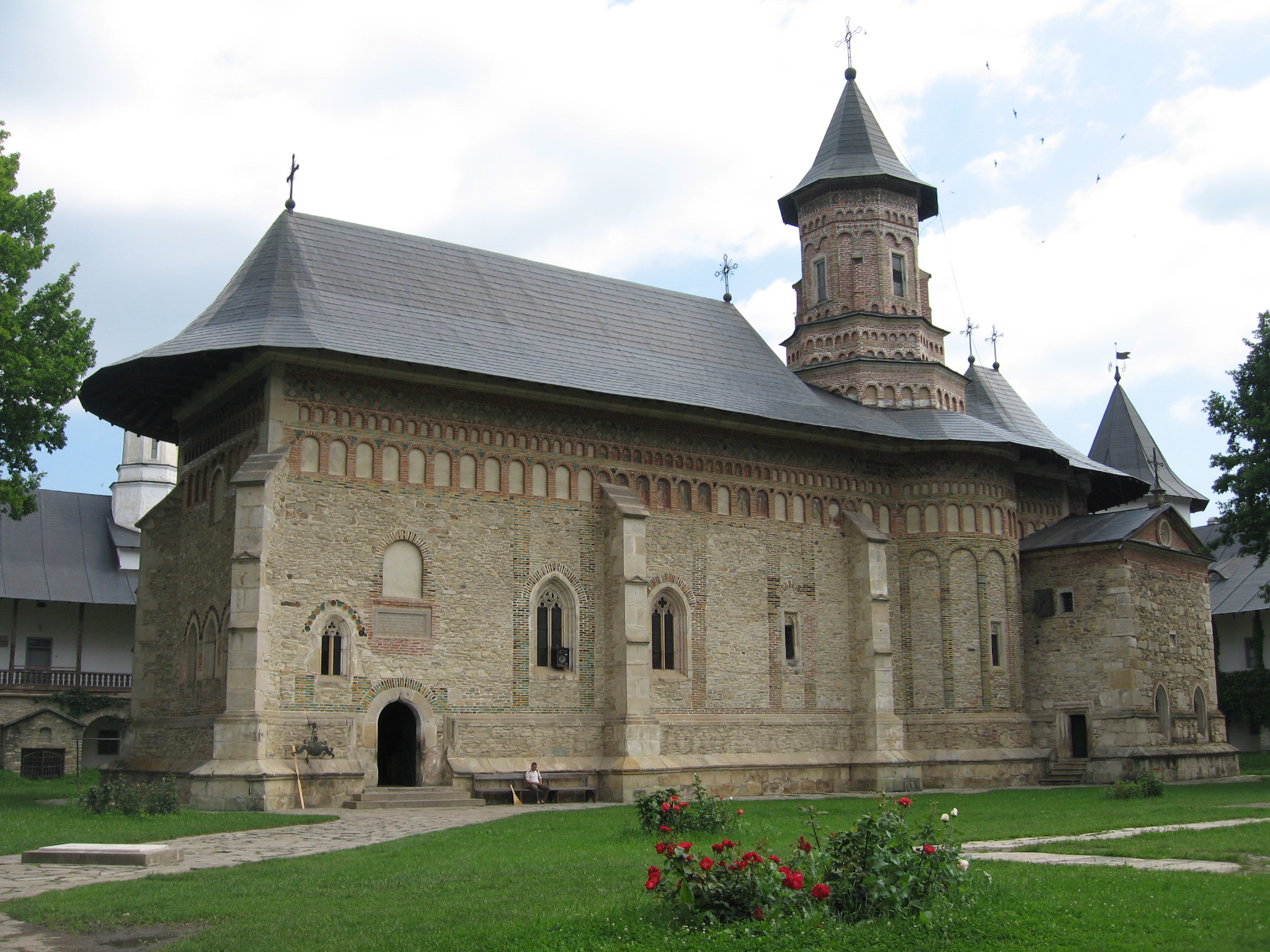 Mănăstirea Neamţ 01